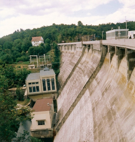 hráz vodní nádrže Vranov